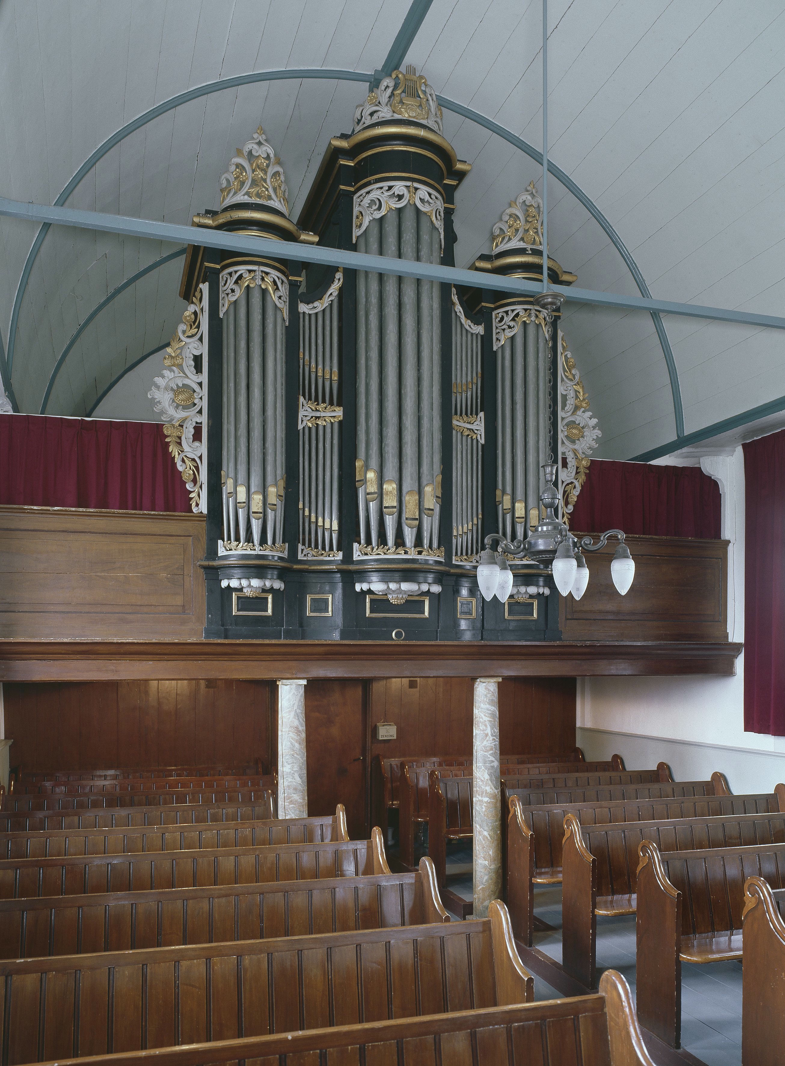 Nederlands Hervormde Kerk: Interieur, aanzicht orgel, orgelnummer 1071 (opmerking: Gefotografeerd voor Het Historische Orgel in Nederland 1878-1886, Bladzijde 264)